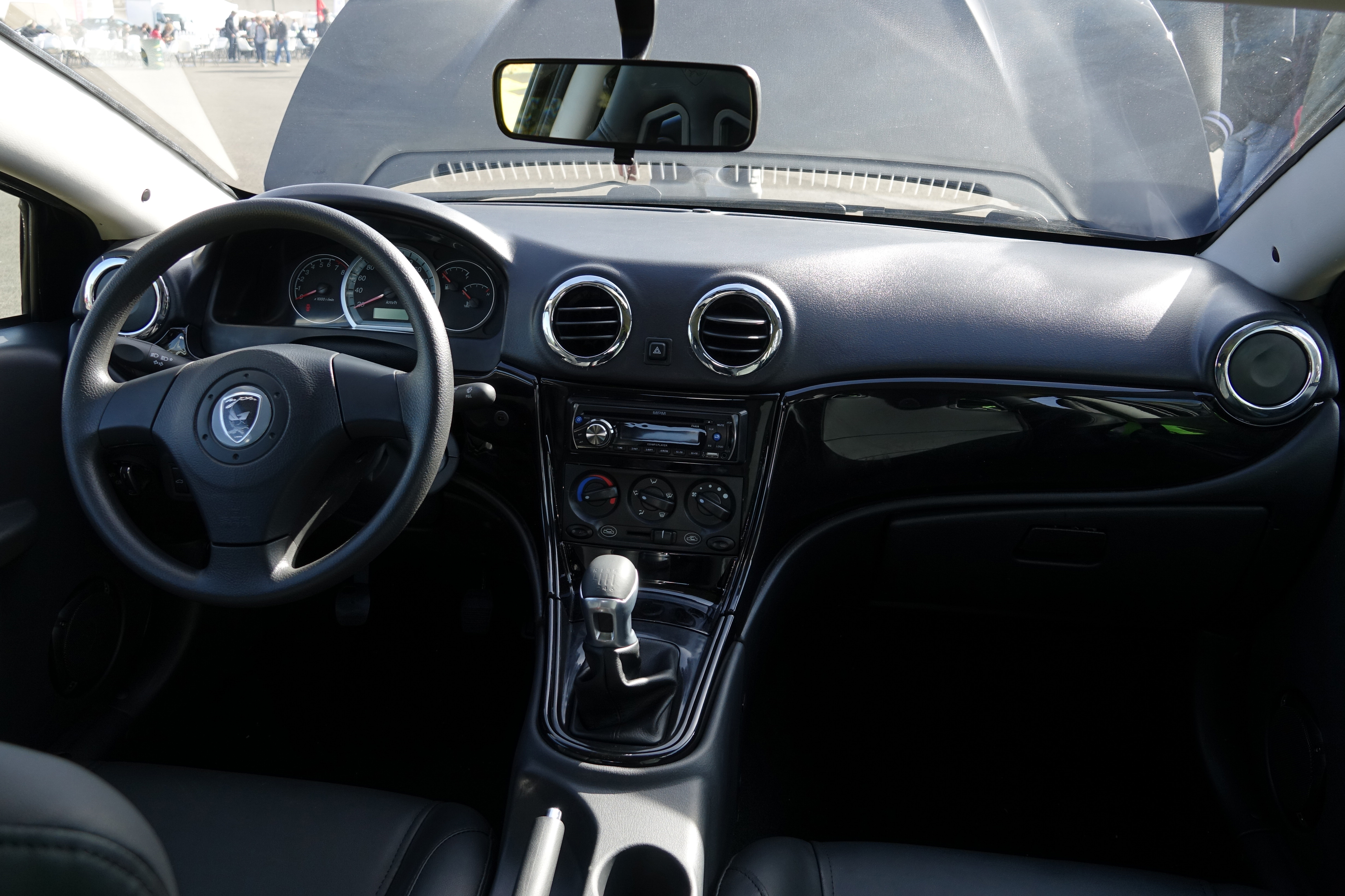 MPM Erelis aux Grandes Heures Automobiles 2018